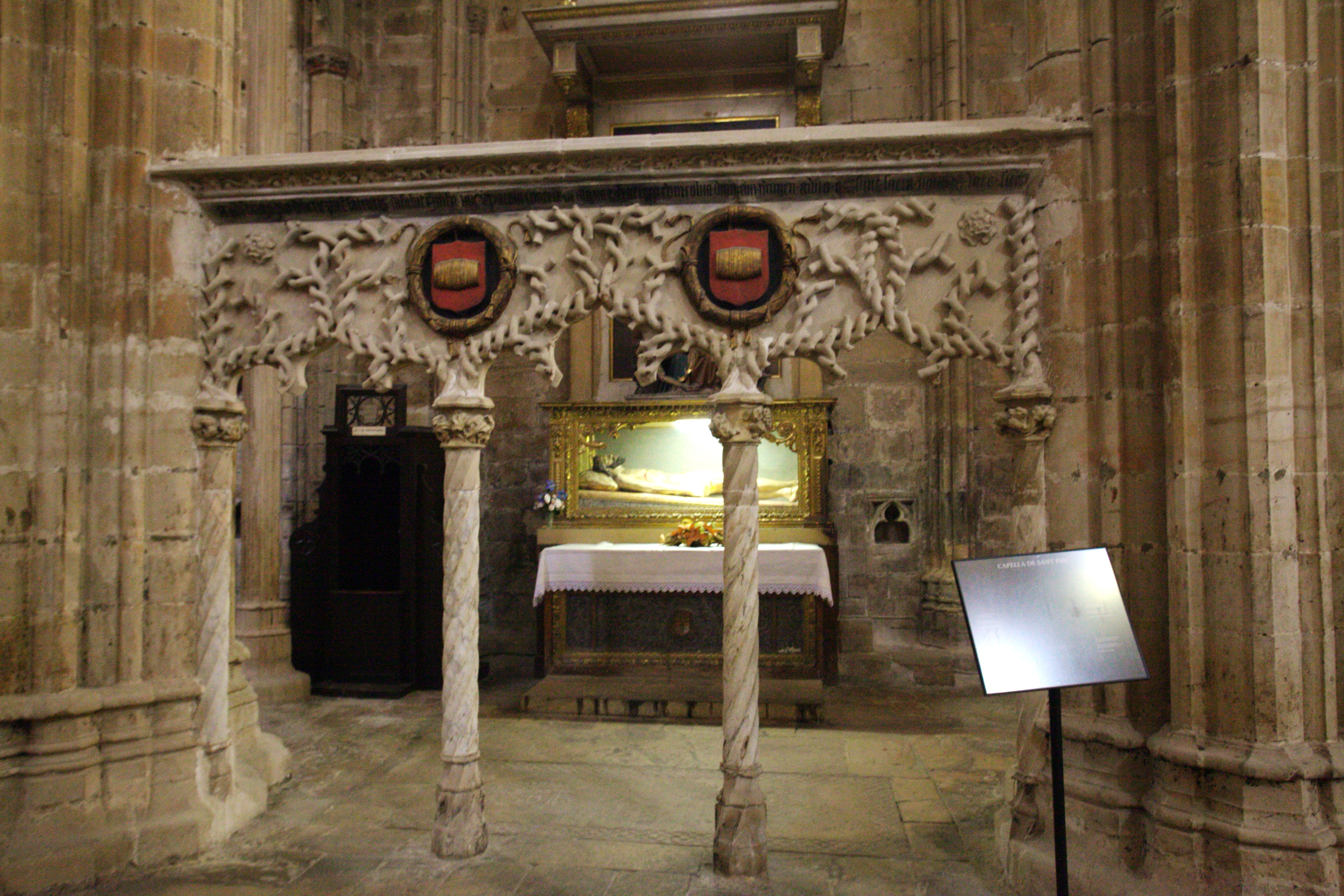 “Capella de la Pietat i del Sant Sepulcre” a la catedral de Tortosa. La tanca de pedra va ser finançada per la família Boteller, de qui es mostra el seu escut